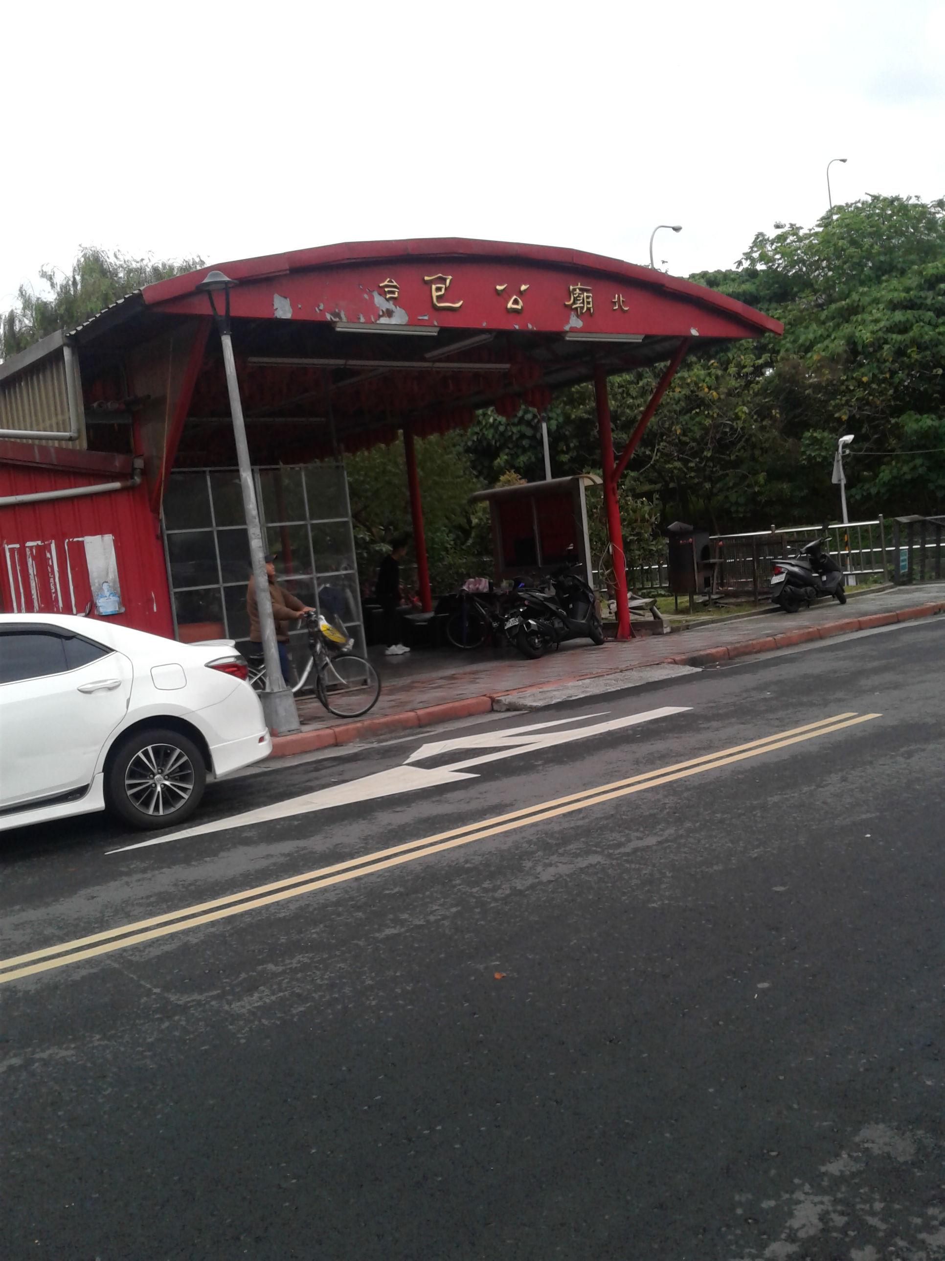 大龍峒包公廟